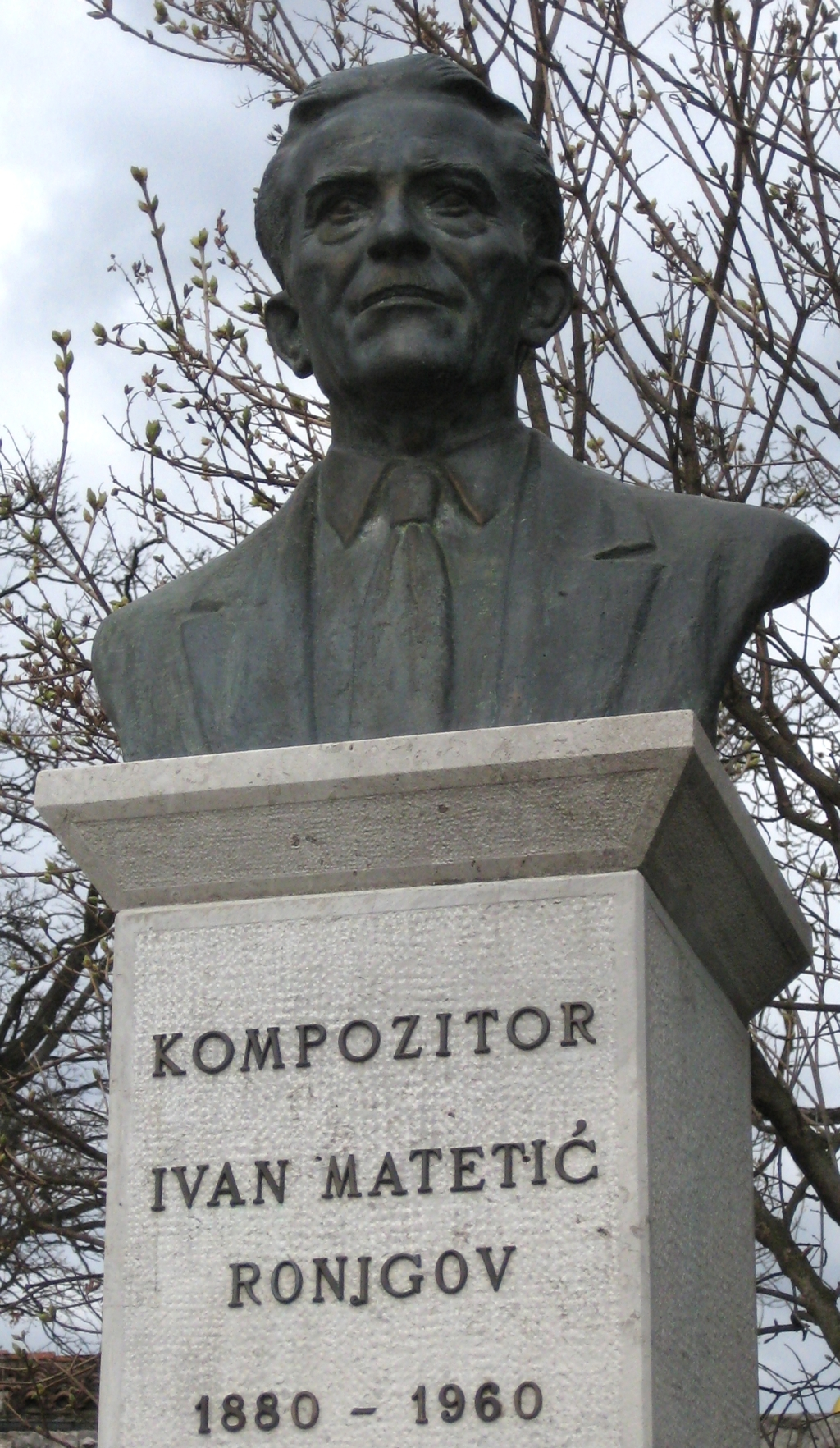 Spomenik Ivanu Matetiću Ronjgovu kod njegove rodne kuće u Ronjgima